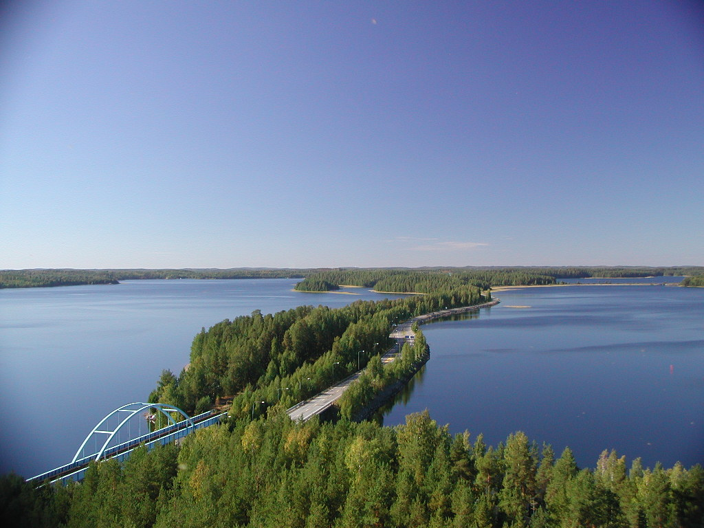 Dateiname : DSCN7541.JPG Dateigröße : 188.7 KB (193219 Byte) Aufnahmedatum : 2002/09/07 00:00:00 Bildgröße : 1024 x 768 Pixel Auflösung : 300 x 300 dpi Farbtiefe : 8 Bit/Kanal Schützen : Aus Ausblenden : Aus Kamera-ID : N/A Kamera : E880 Qualitätsmodus : NORMAL Messmethode : Mehrfeld Belichtungsbetriebsart : Programmautomatik Speedlight : Nein Brennweite : 8 mm Verschlusszeit : 1/274.1 Sekunde Blende : F2.8 Belichtungskorrektur : 0 EV Fester Weißabgleich : Automatik Objektiv : Integriert Blitz-Synchronisierungsmodus : Erster Verschlussvorhang Belichtungsdifferenz : N/A Flexibles Programm : N/A Empfindlichkeit : Auto Schärfung : Automatik Farbmodus : Farbe Farbeinstellungen : N/A Farbsättigung : N/A Farbsättigung : N/A Tonwertkorrektur : Normal Breite (GPS) : N/A Länge (GPS) : N/A Höhe (GPS) : N/A